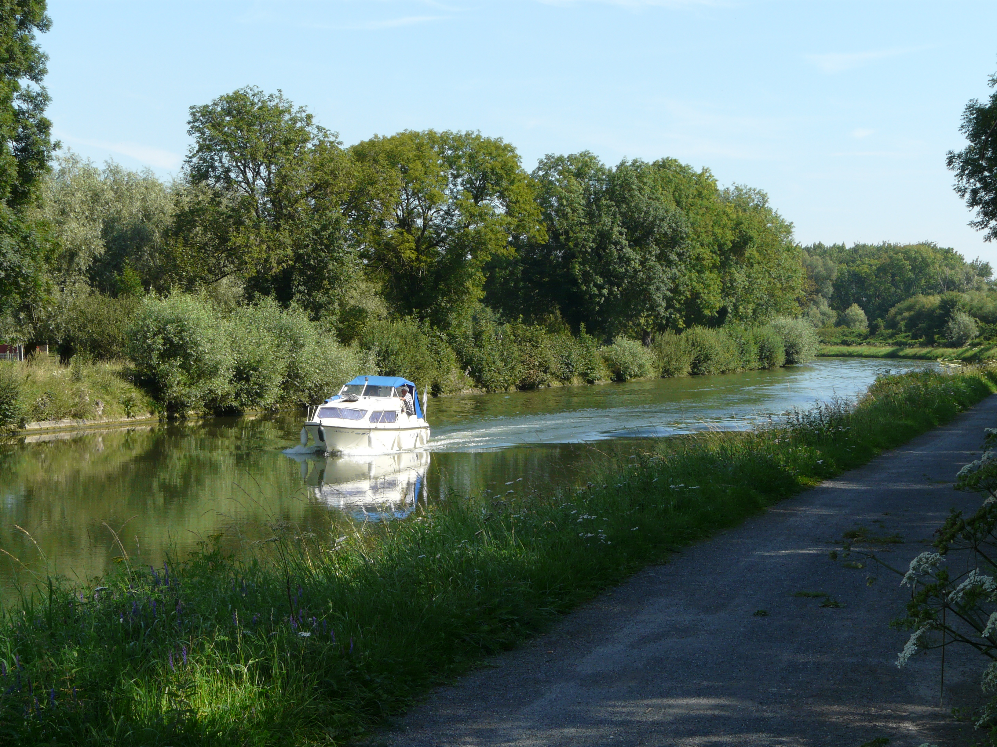 Tourisme fluvial sur le canal de l'Escaut à Escaudoeuvres